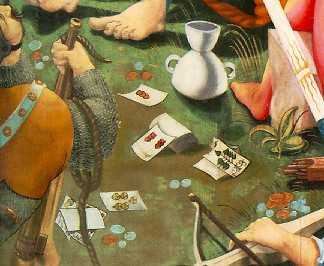 Ausschnitt aus dem Herrenberger Altar